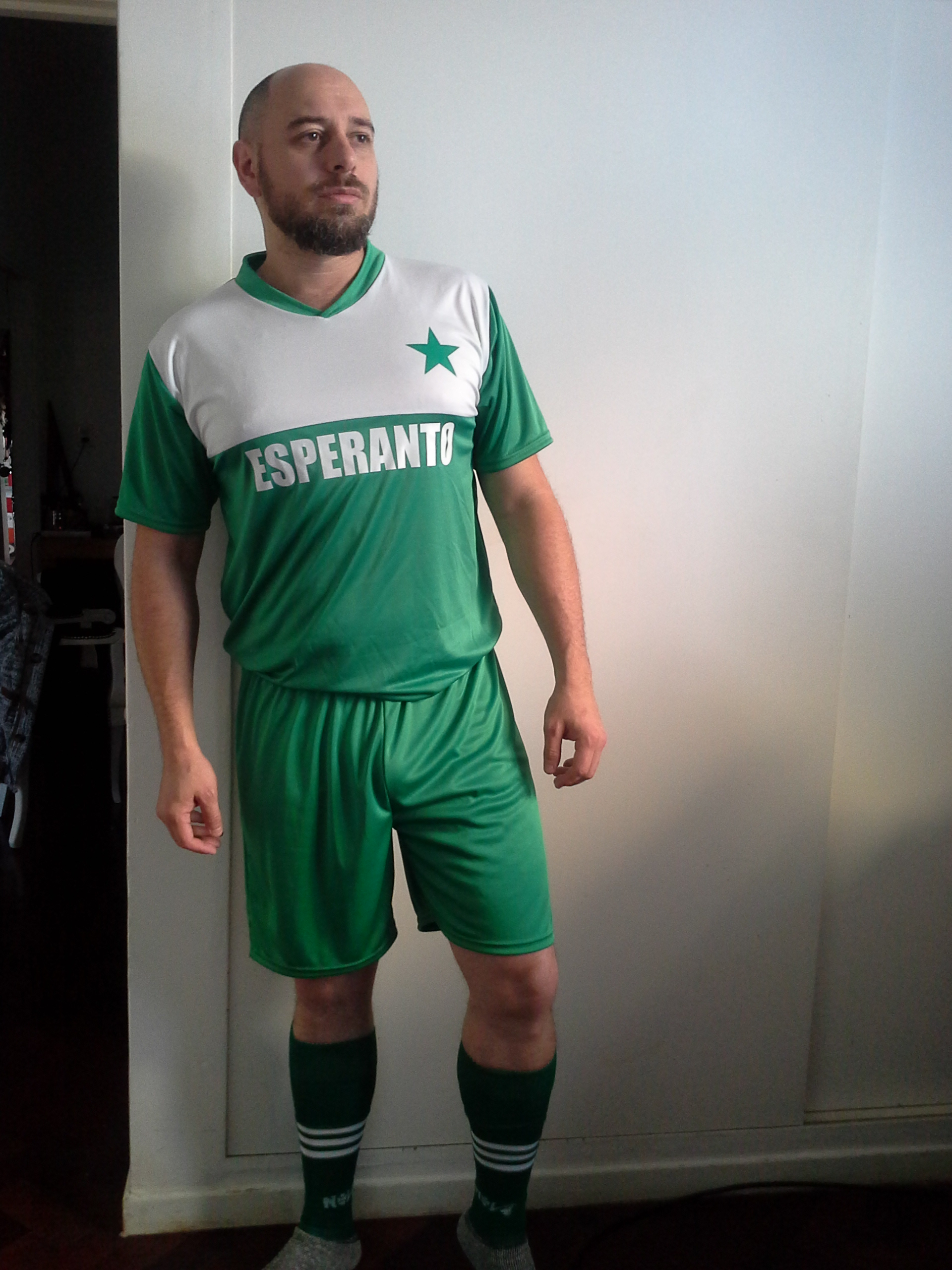 Uniforme del equipo de la selección de Esperanto, para el partido del 31 de julio de 2014 que enfrento a esta selección contra la de la comunidad de descenciente armenios de argentina en Buenos Aires, en el cuado del 99avo Congreso Universal de EsperantoEsperanto: Uniformo de la Esperanta selektitaro, por la matĉo de la 31a de julio 2014 inter la esperanta teamo kaj la armen-devena argentina komunumo en Bonaero, kadre de la 99a UK.